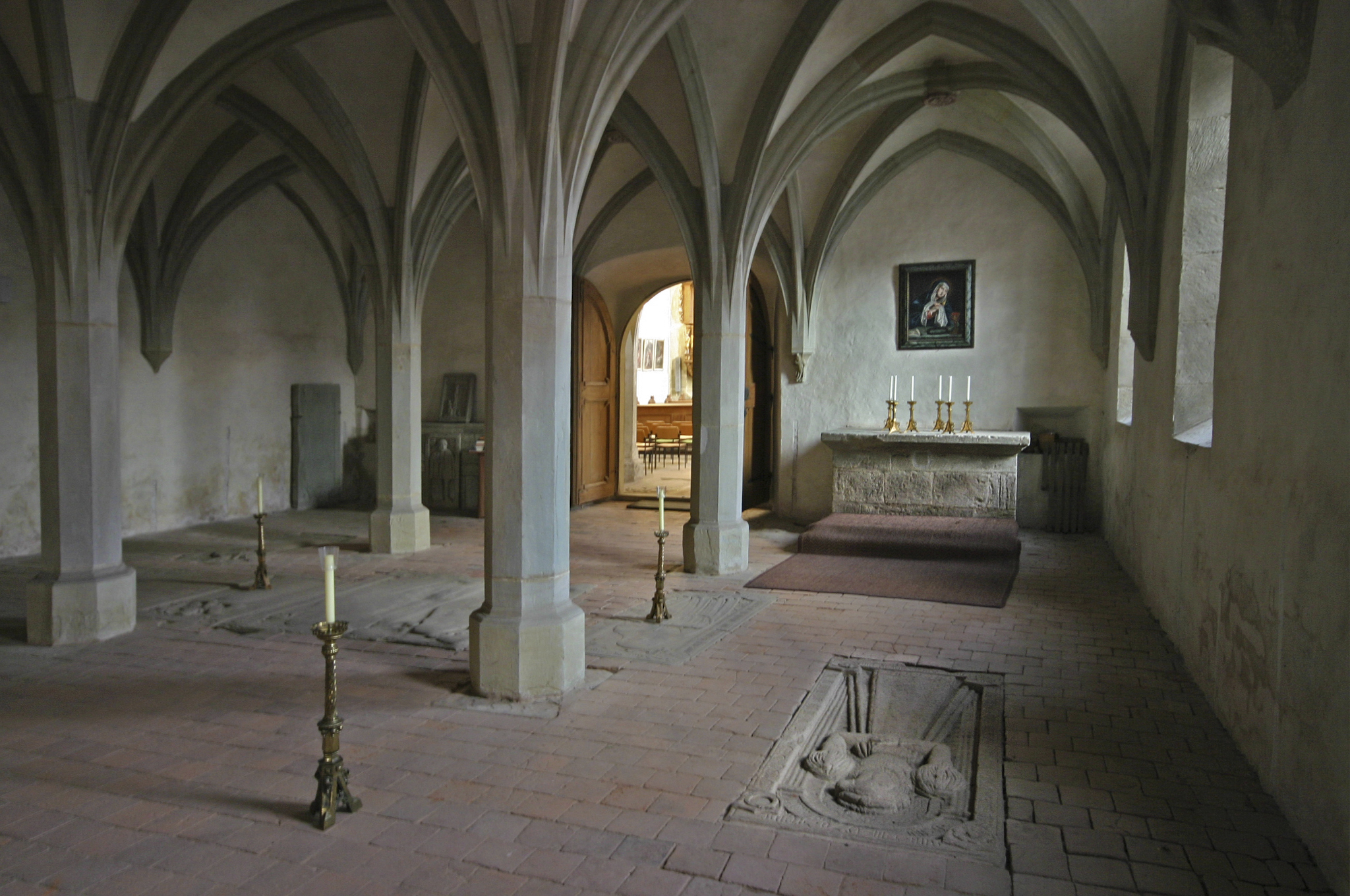 Gruft der Klosterkirche mit diversen Grabsteinplatten